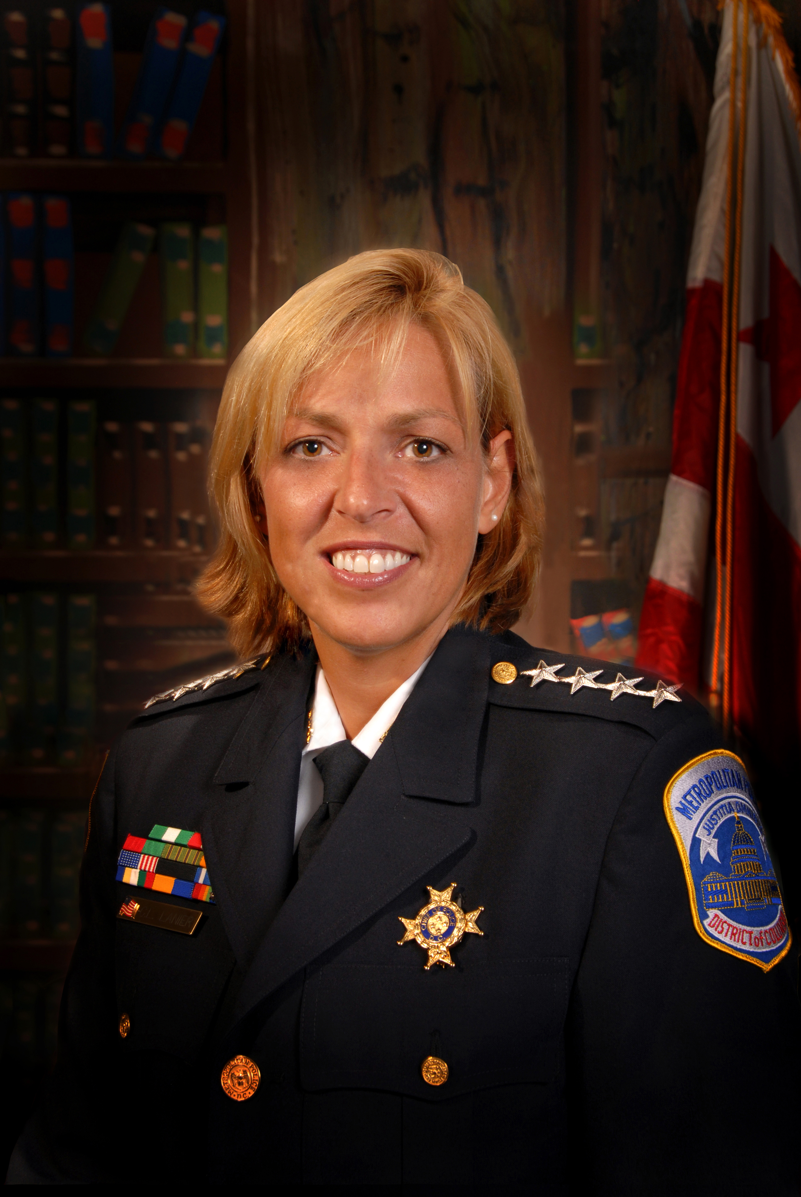 Cathy L. Lanier